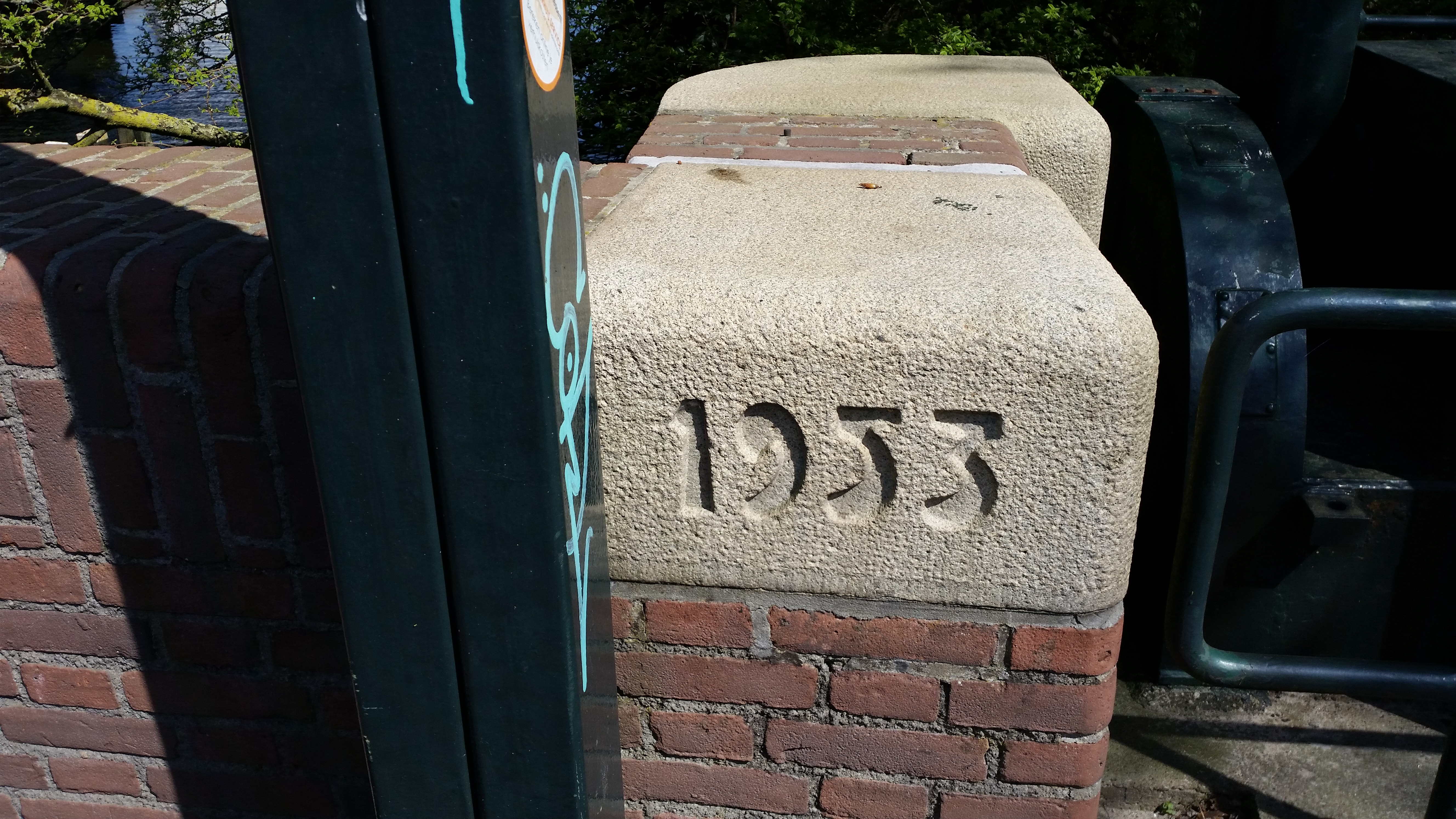 Jaarsteen bij Omvalbrug, Amsterdam